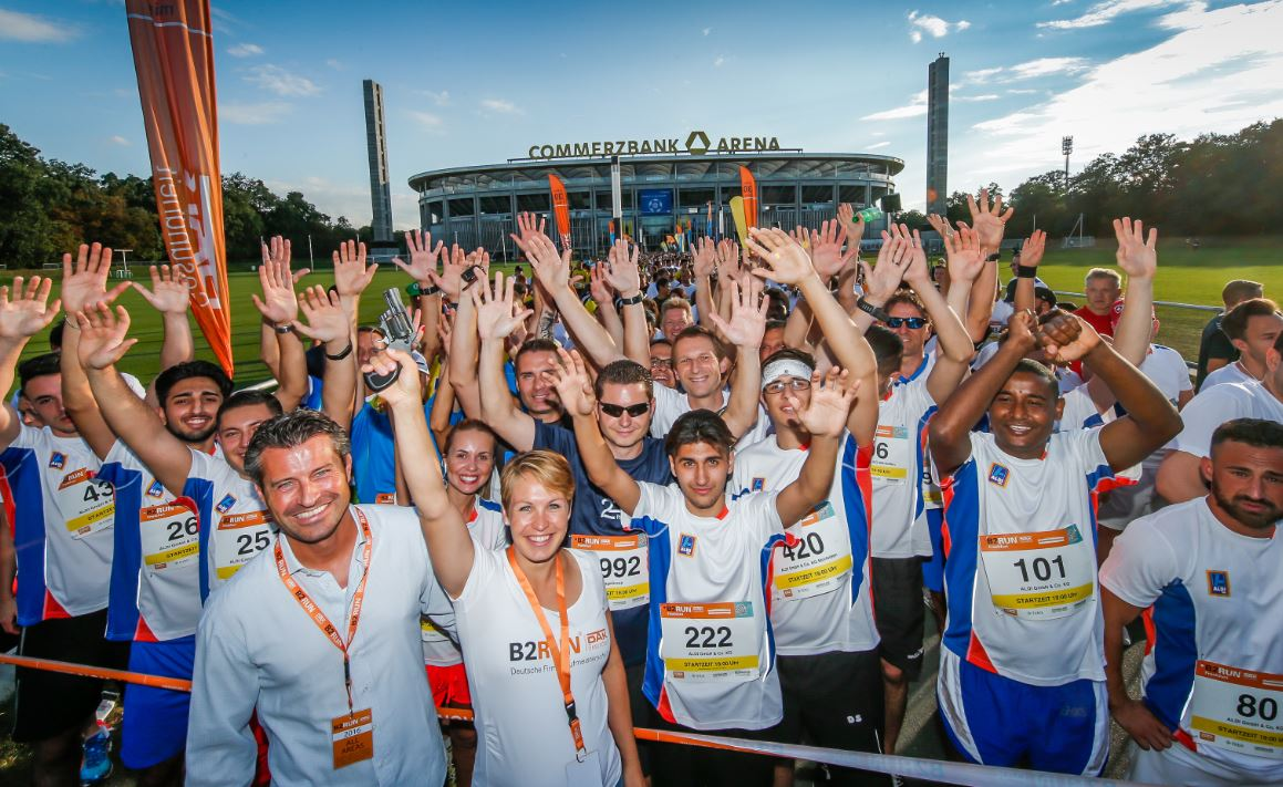 B2Run Frankfurt